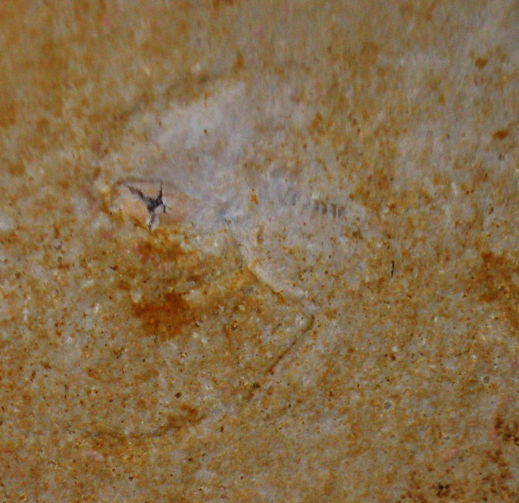 Fossil of Clausocaris, an extinct thylacocephalan- Took the photo at Fossil Show, Munchen 2011